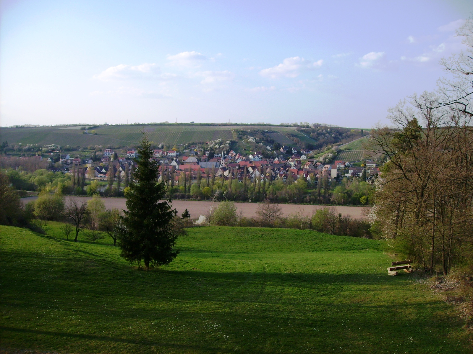 Frickenhausen am Main, Deutschland